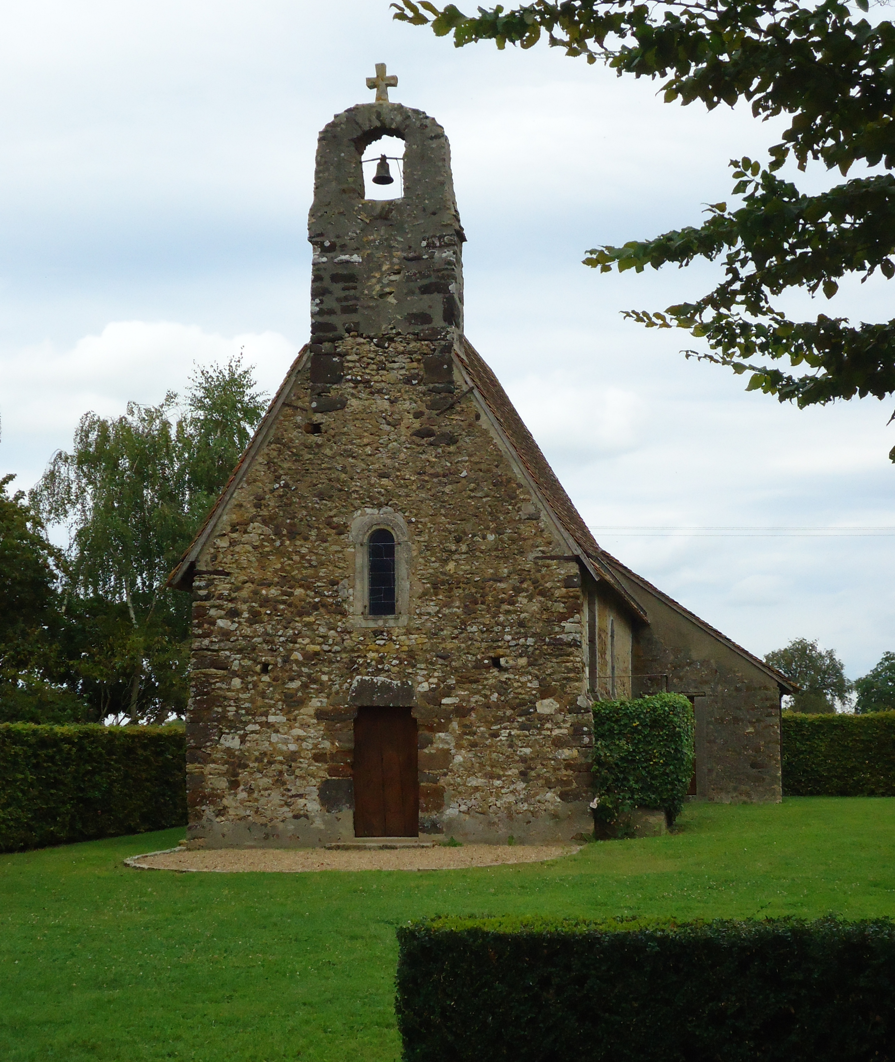 Chapelle Saint-Anne (XIe & XIIe) - Laigné-en-Belin - Sarthe (72)